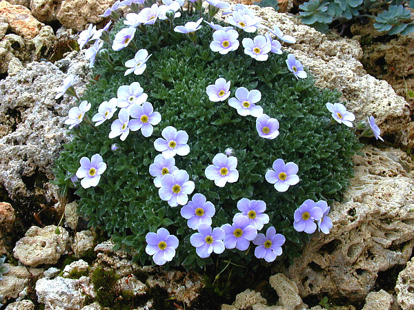 Plante de l'Himalaya formant des coussins aplatis ou tapis pouvant atteindre 1 m de diamètre sur 5 cm de haut. On la rencontre entre 3500 et 4500 m dans les pelouses rocheuses et dans les pierriers. (Photo en culture)